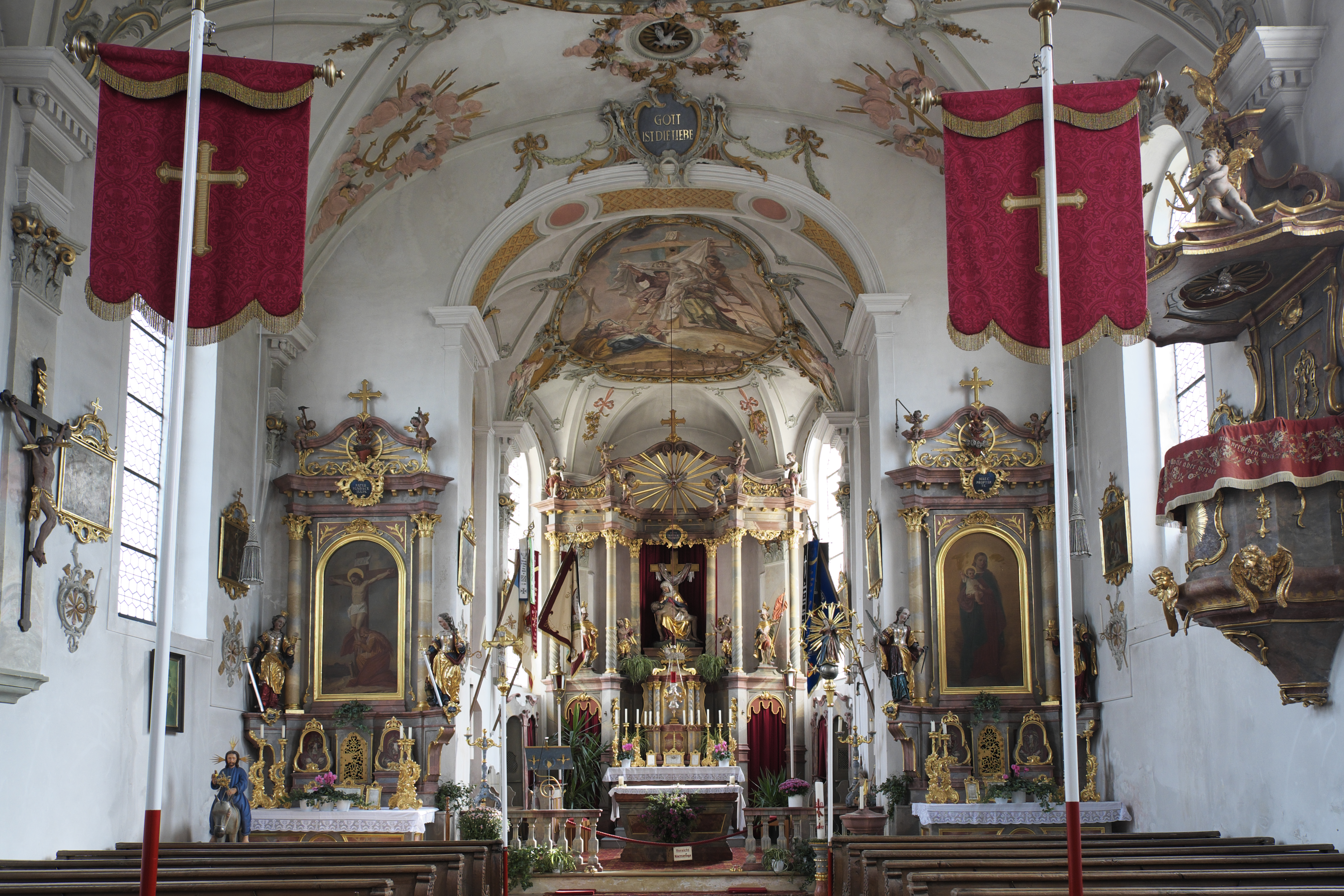 Katholische Pfarrkirche Zur Schmerzhaften Muttergottes in Waalhaupten (Waal) im Landkreis Ostallgäu (Bayern/Deutschland), Innenraum